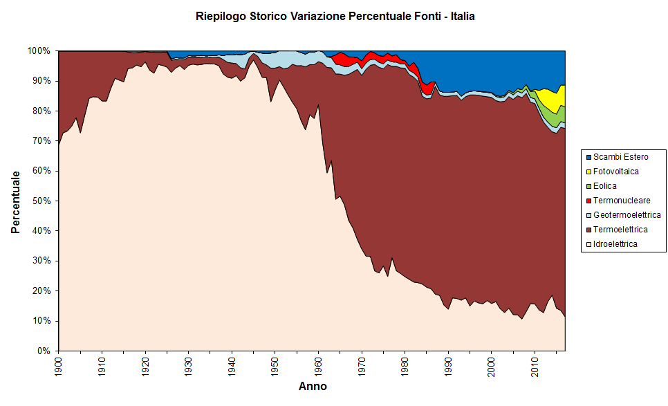 Riepilogo storico variazioni percentuali delle fonti di produzione energia elettrica italiana.